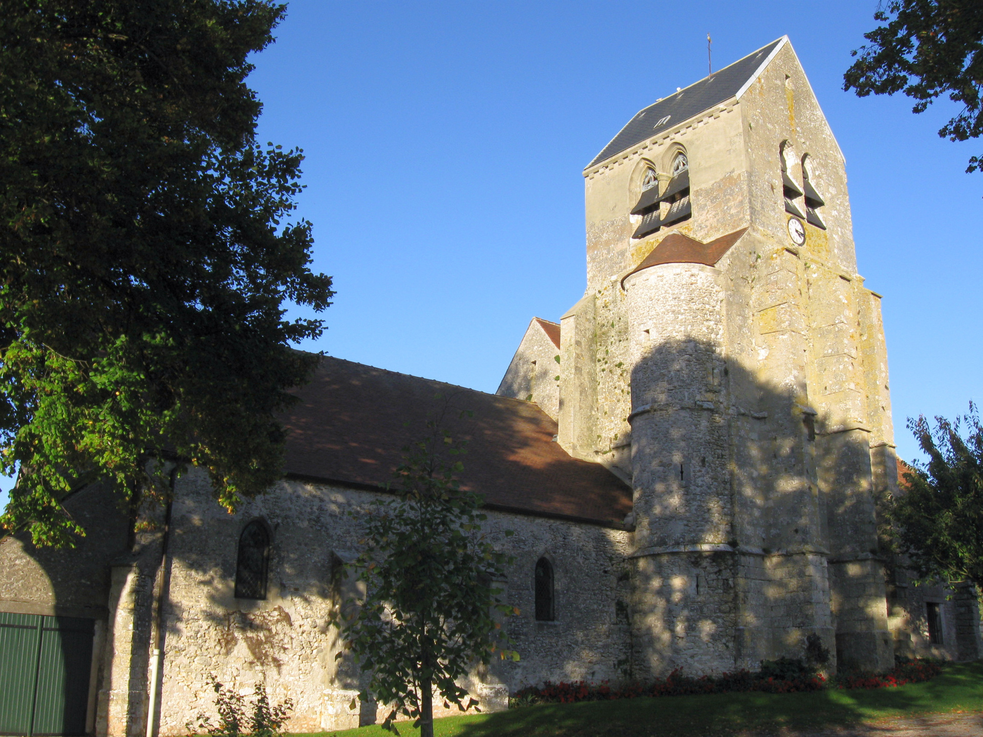 Église de la Nativité-de-la-Vierge de Lescherolles. (département de la Seine-et-Marne, région Île-de-France).